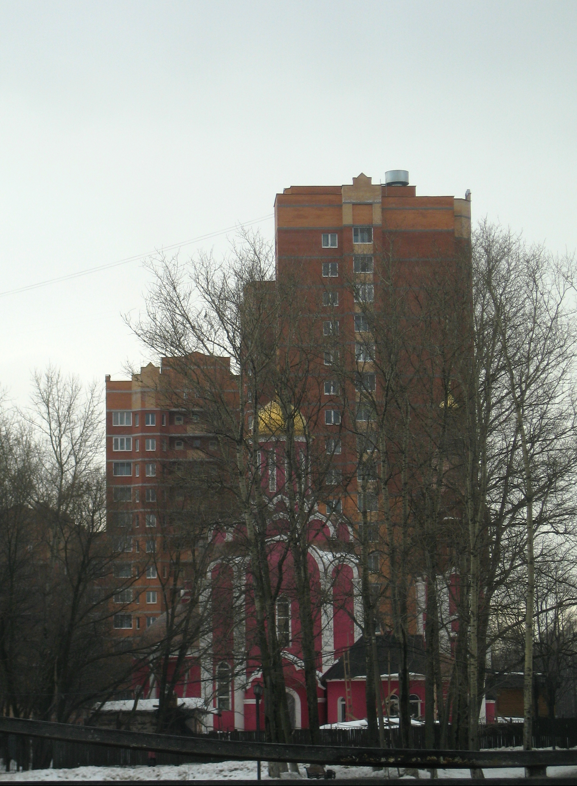 Церковь в Кучино